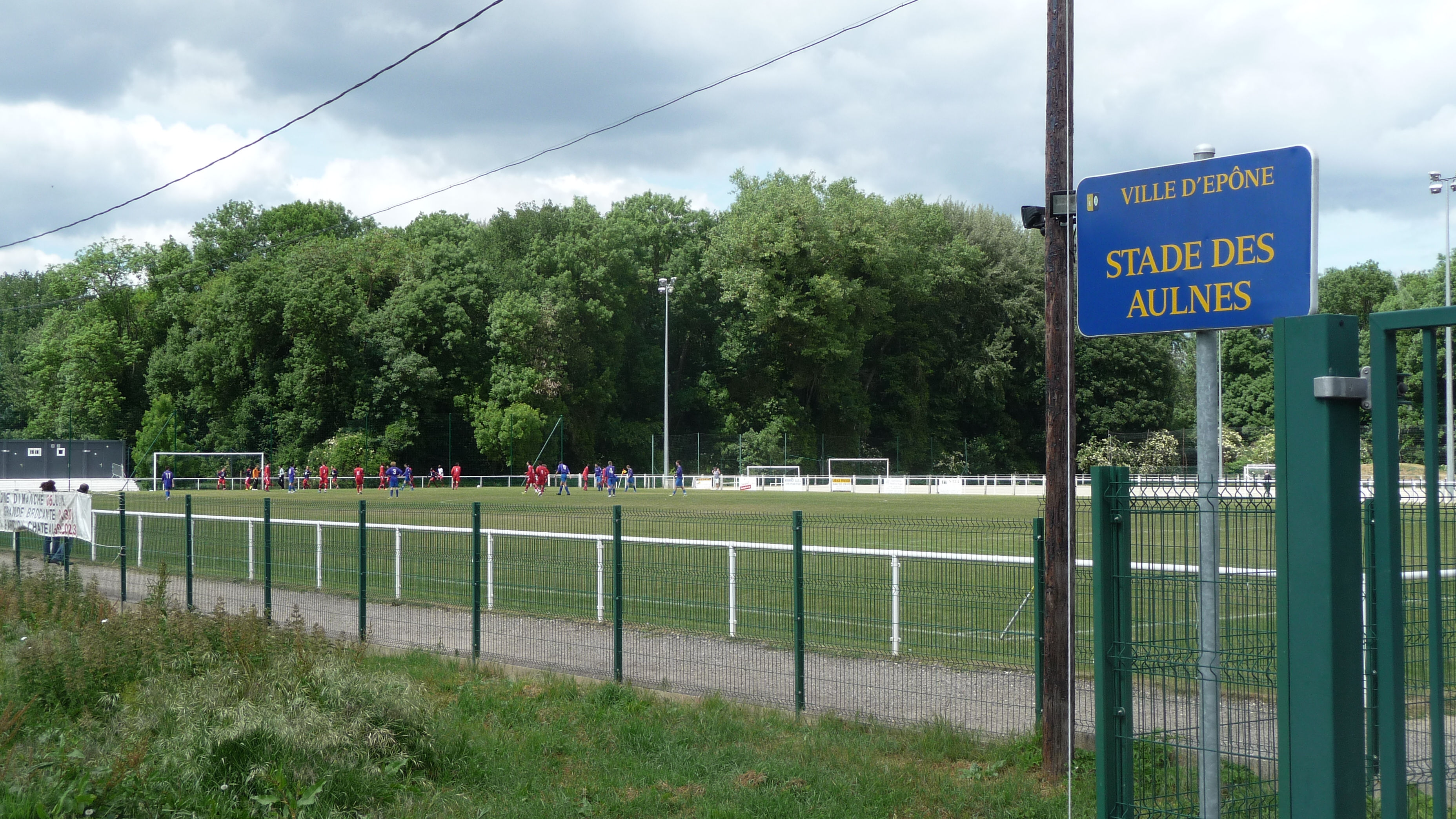 Le stade des Aulnes à Épône (Yvelines, France) (en réalité dans le territoire de La Falaise).